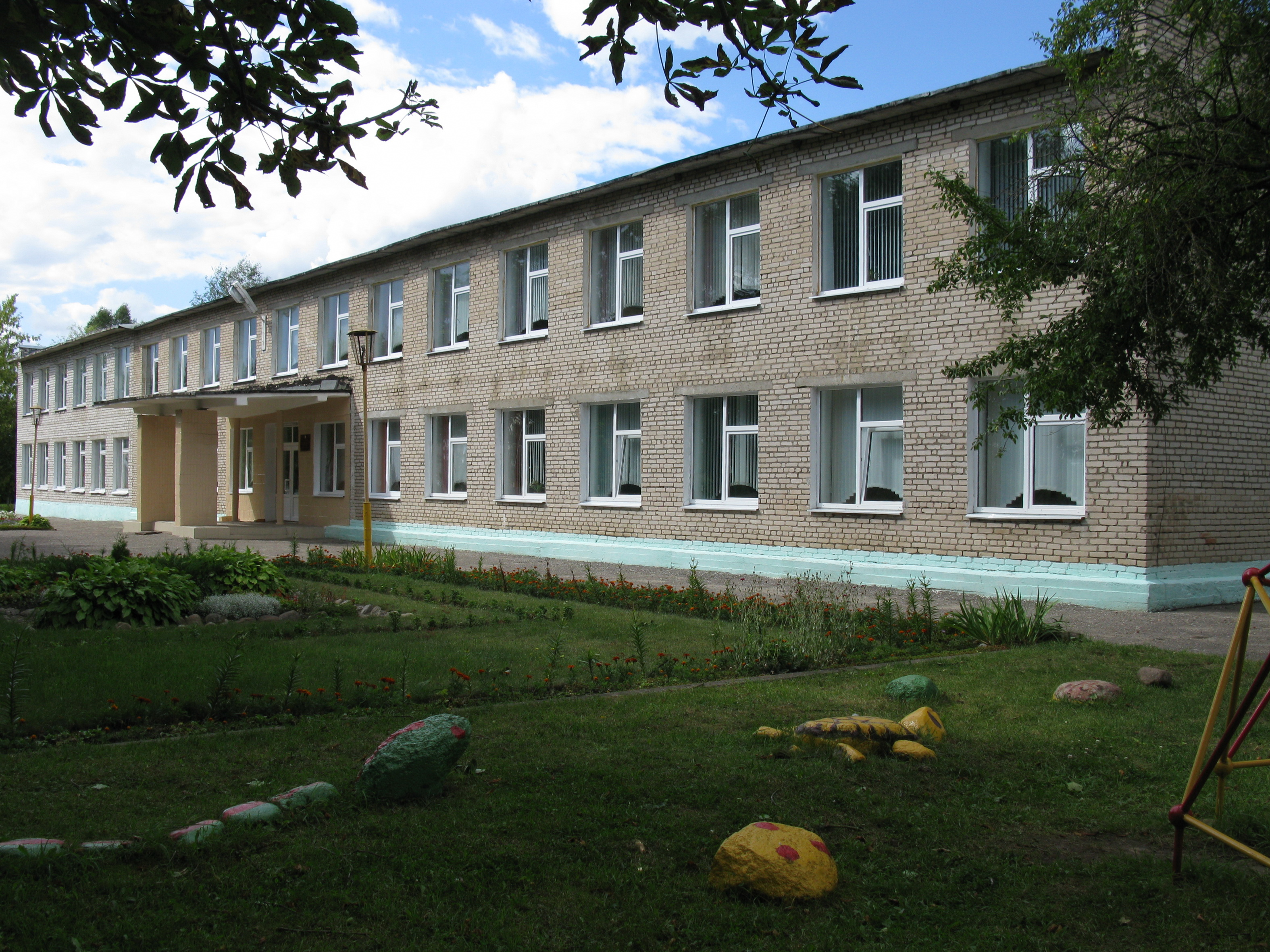 Сыроватки.Сыроваткинская средняя школа-сад. Общий вид. 2013